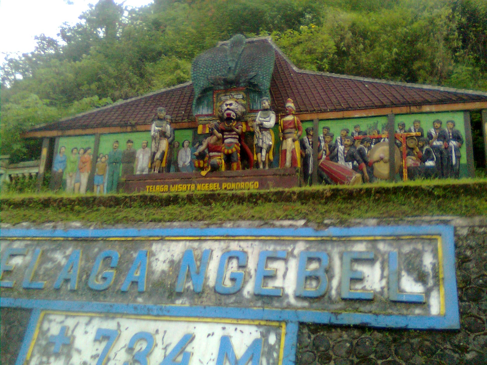 Ngebel